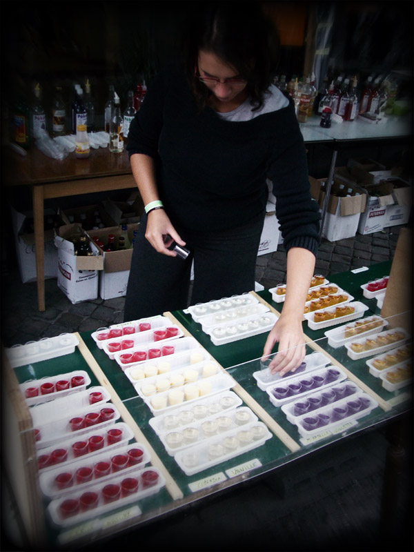 stand vendant du pecket aromatisé lors des Festivités du Quinze-Aout a Liège.